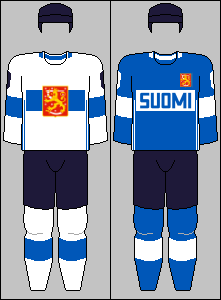 Finnish national team jerseys from World Cup of Hockey 2016 ... Big thanks to Realismadder for a large share on these jerseys.